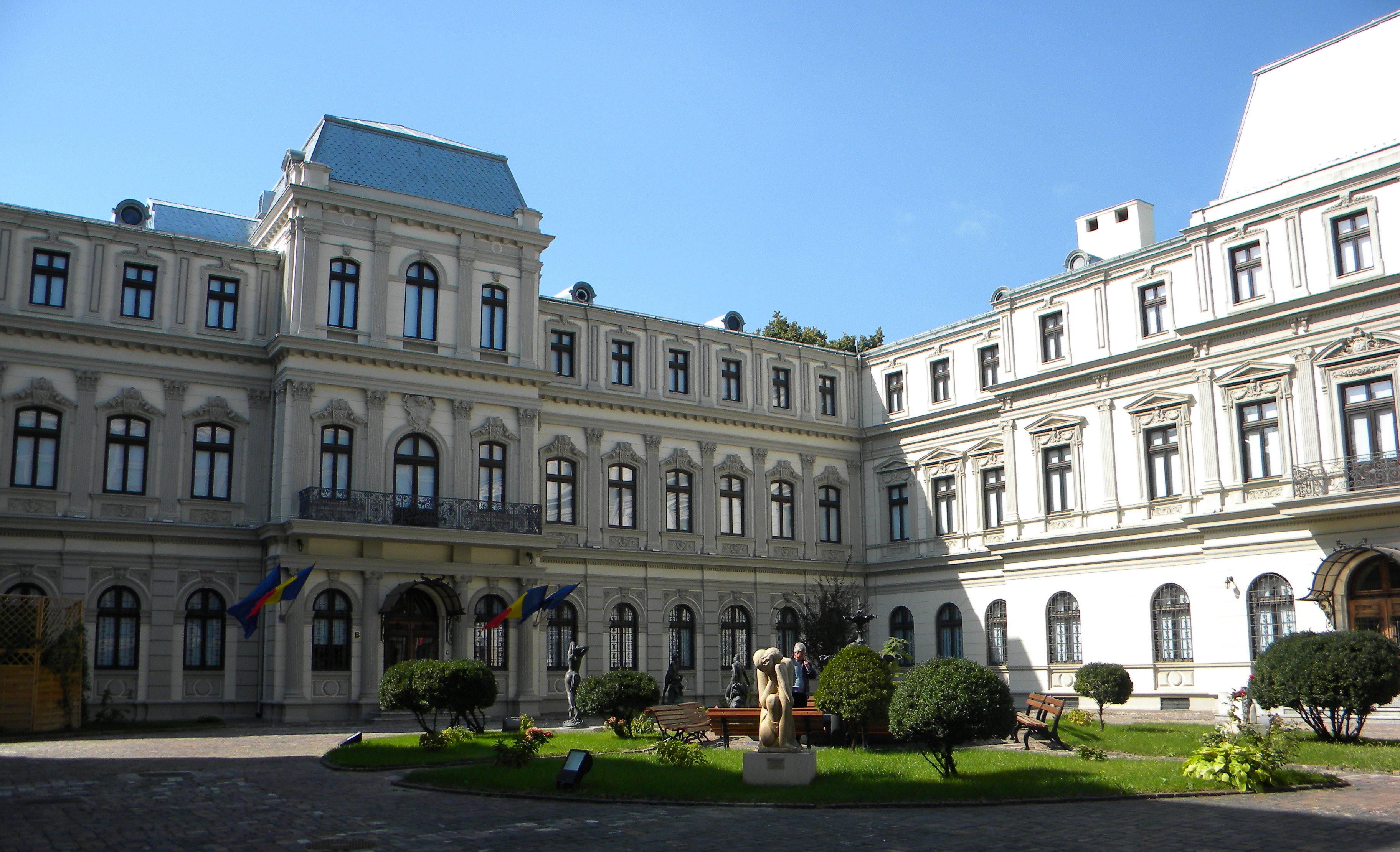 București, România, Muzeul Colecțiilor, Calea Victoriei nr. 111-113, sector 1